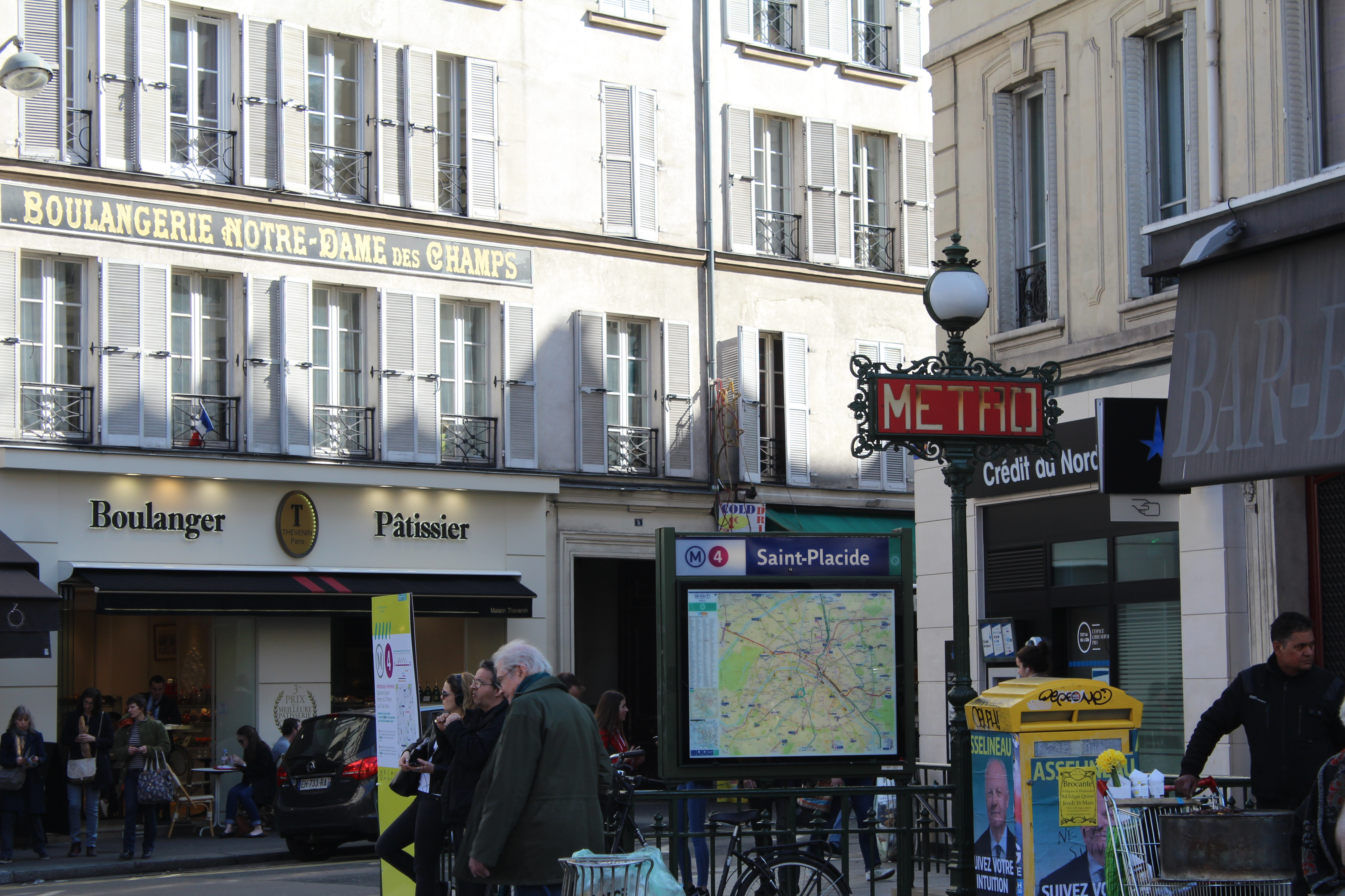 Entrée de la station de métro Saint-Placide à Paris.